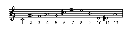 Série d'Alwa dans l'opéra Lulu d'Alban Berg